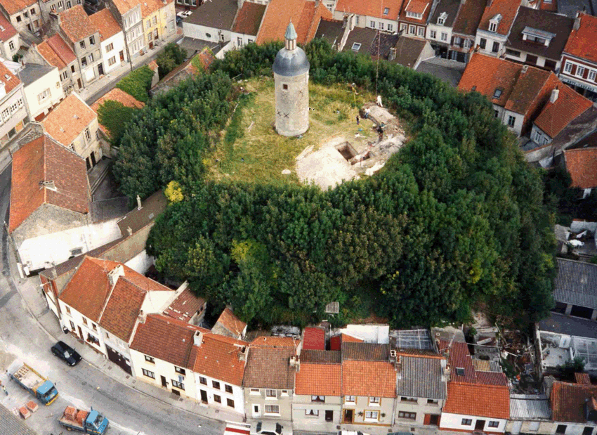 vue aérienne